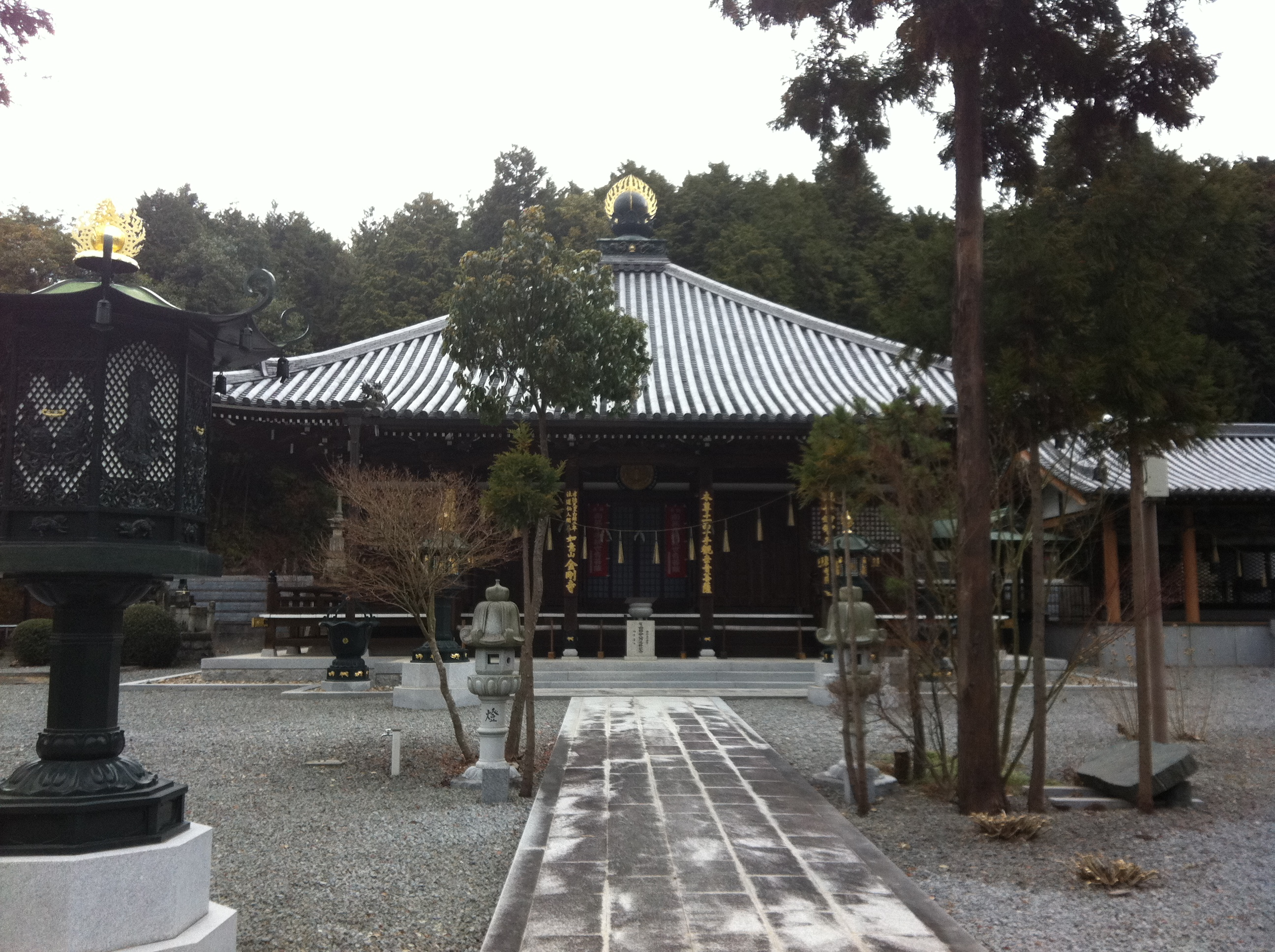 金剛寺（三木市大村）